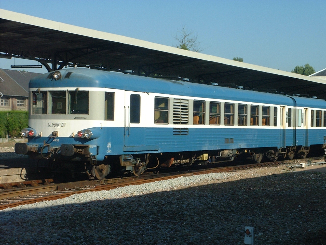 DSCF0021b